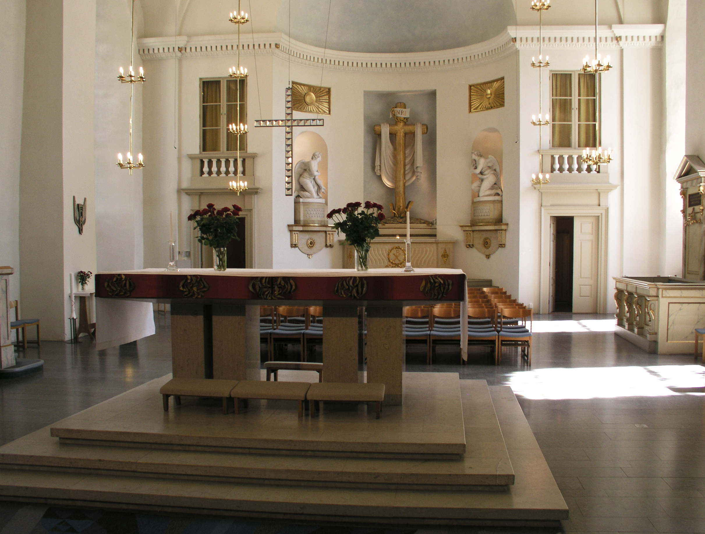 Karlstads domkyrka / Cathedral of Karlstad. Altar.